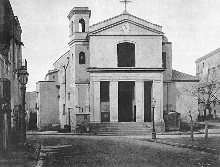 Chiesa di S.Vitale Martire in una foto della seconda metà dell'800.